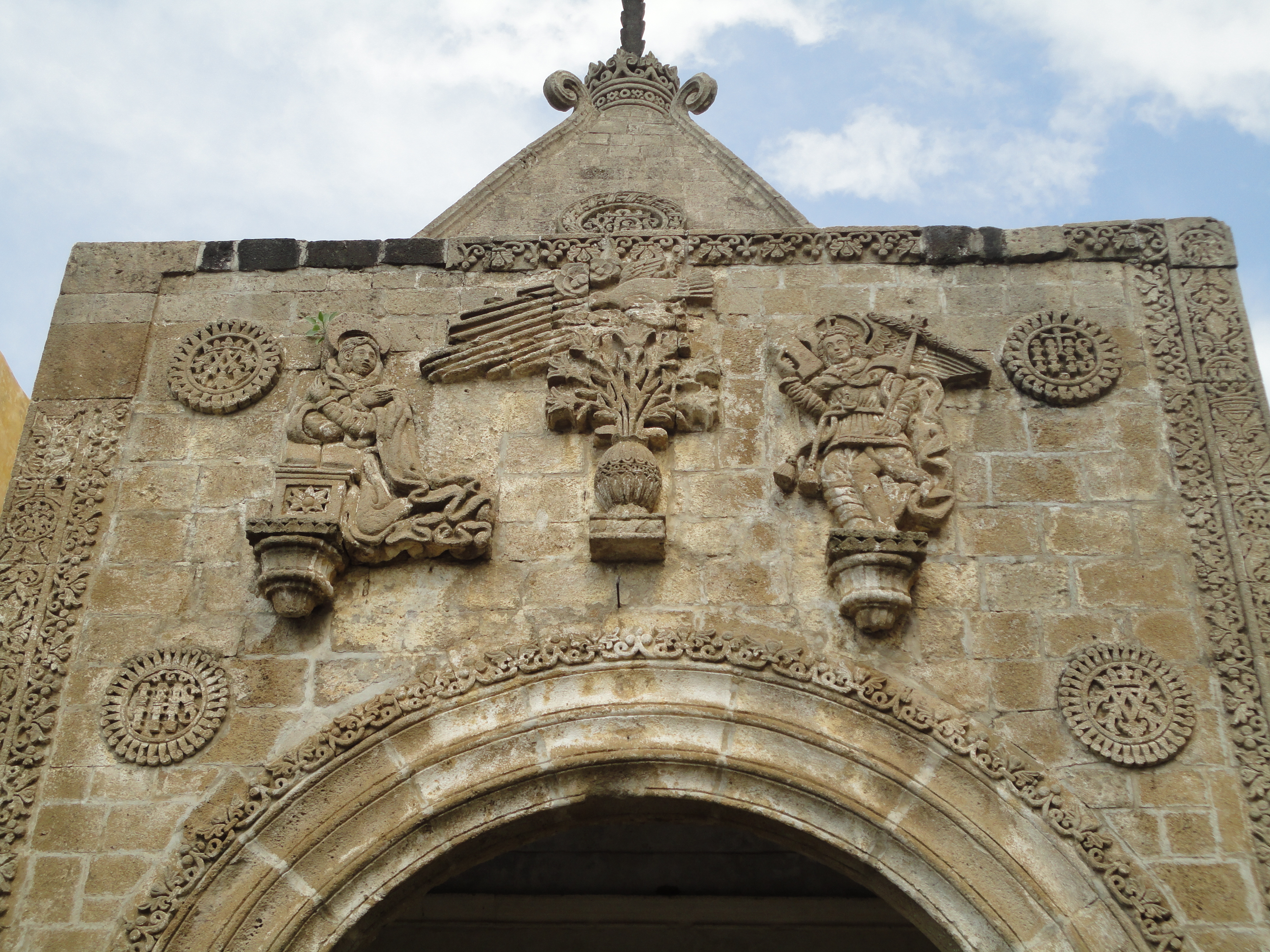 Otra escena